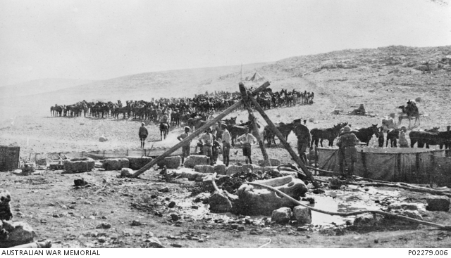 יחידות פרשים משקות את הסוסים והגמלים במהלך הקרב על תל חווילפה